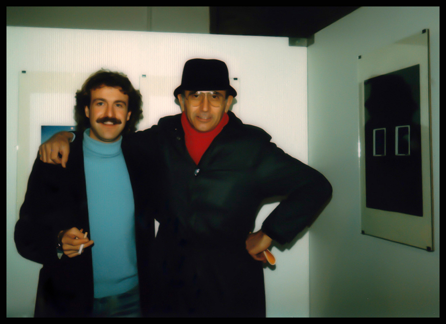 Augusto De Luca e Franco Fontana alla mostra fotografica di De Luca - Galleria Civica di Modena (18 dicembre 1982).